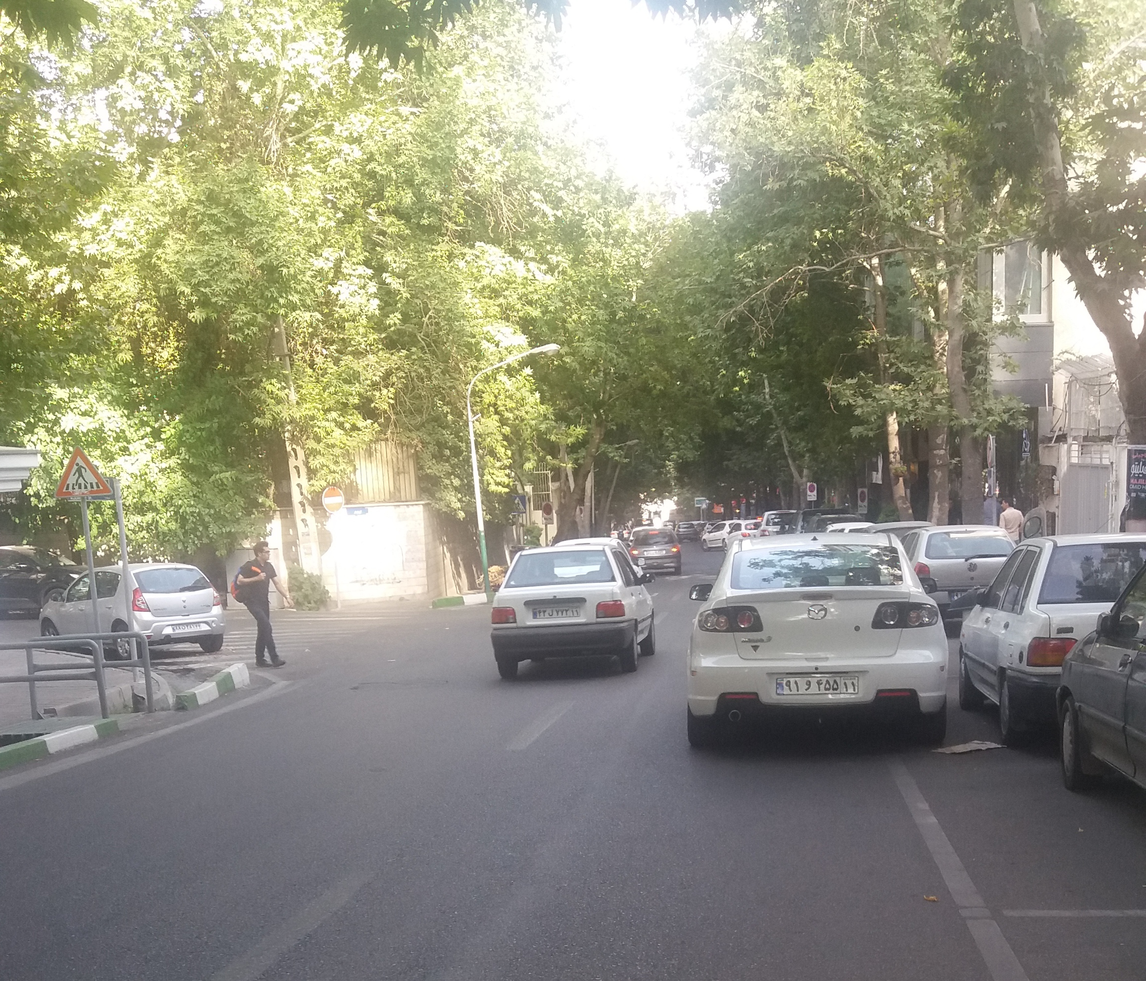 خیابان فرشته، تهران - ۱۳۹۵